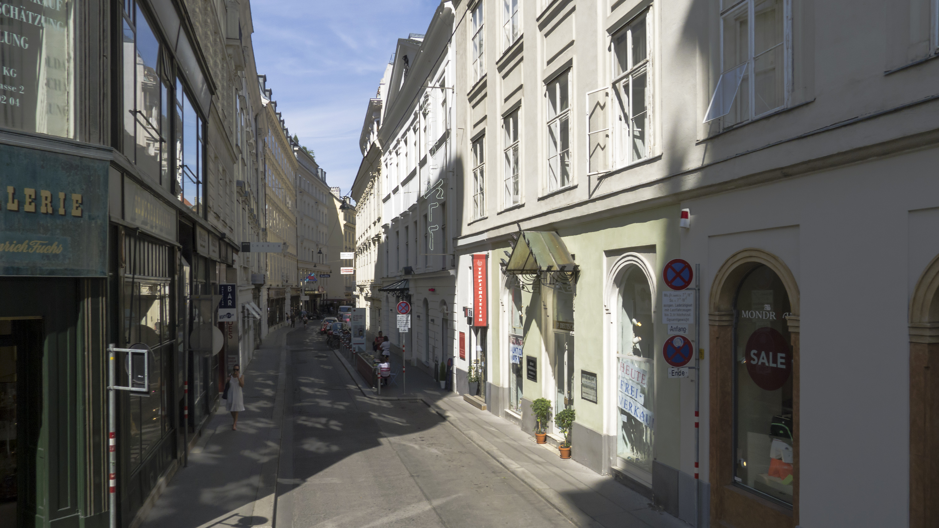 Dorotheergasse in Wien 1 bei Nr. 13 Richtung Nordosten